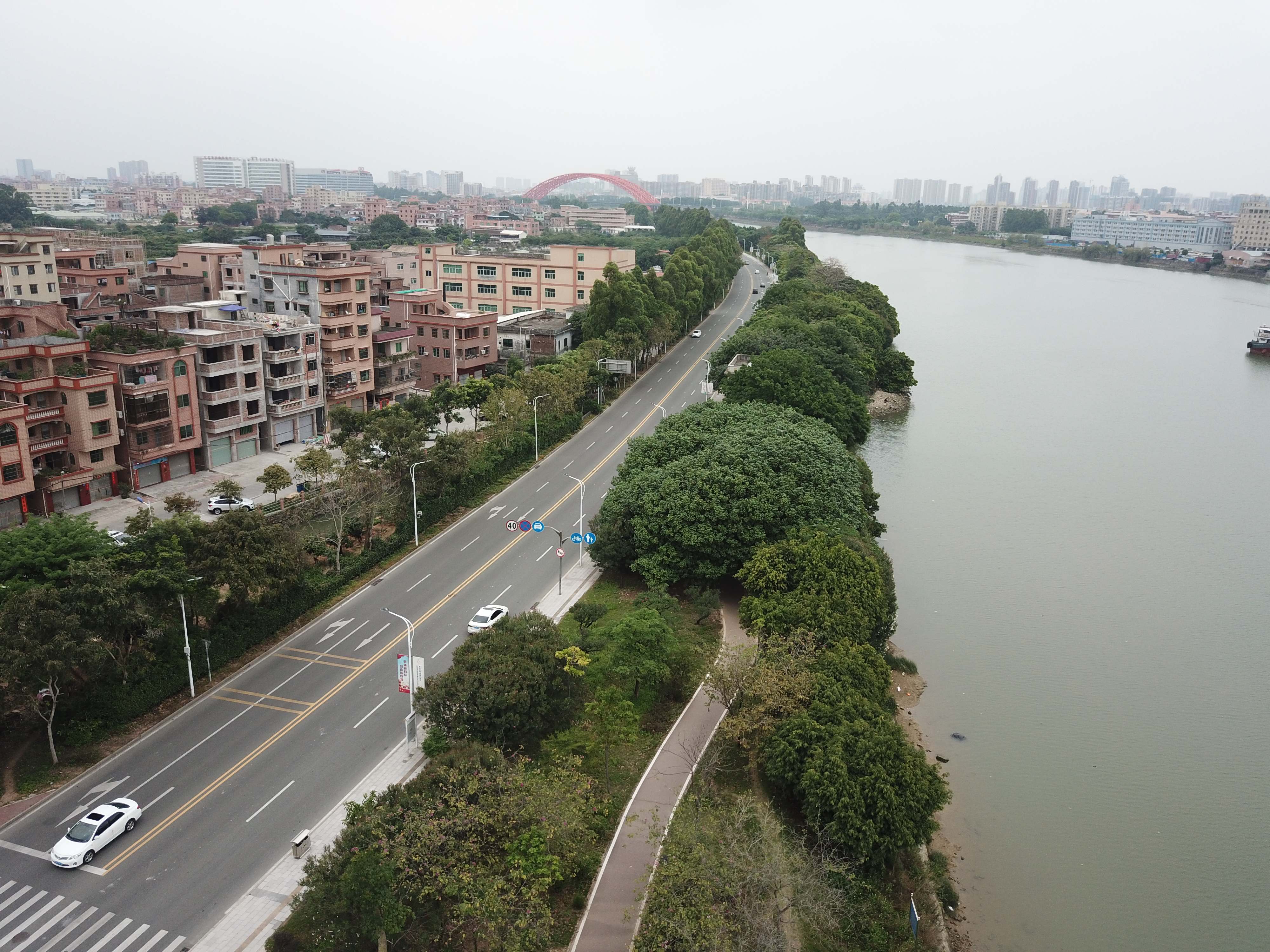 东江在东莞的一段